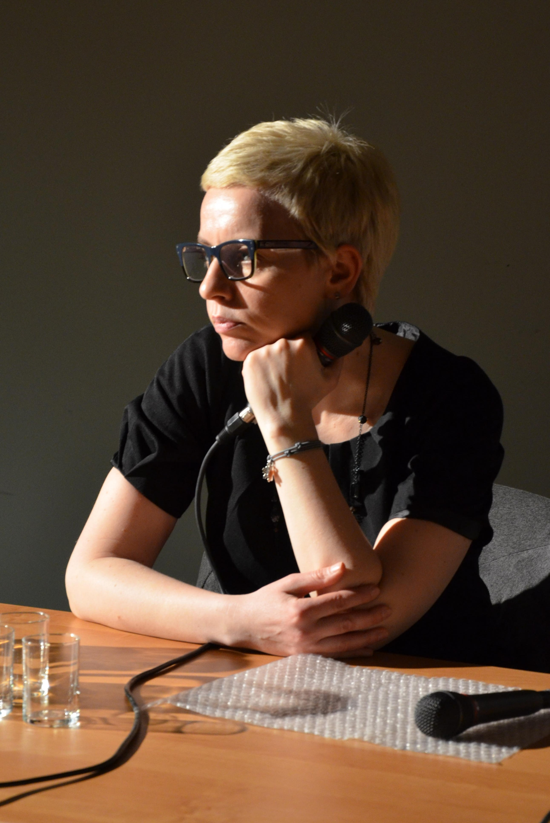 Magdalena Grzebałkowska bei der Vernissage des Buches "Beksińscy. Portret podwójny"